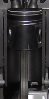 secțiune a unui cilindru motor